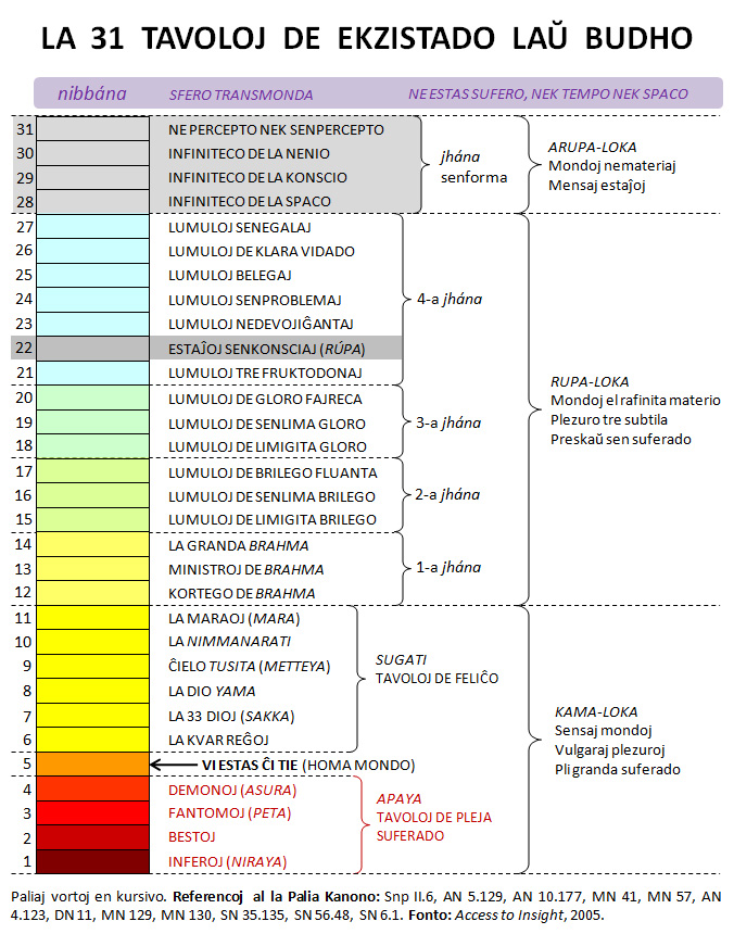 La 31 tavoloj de ekzistado laŭ Budho.